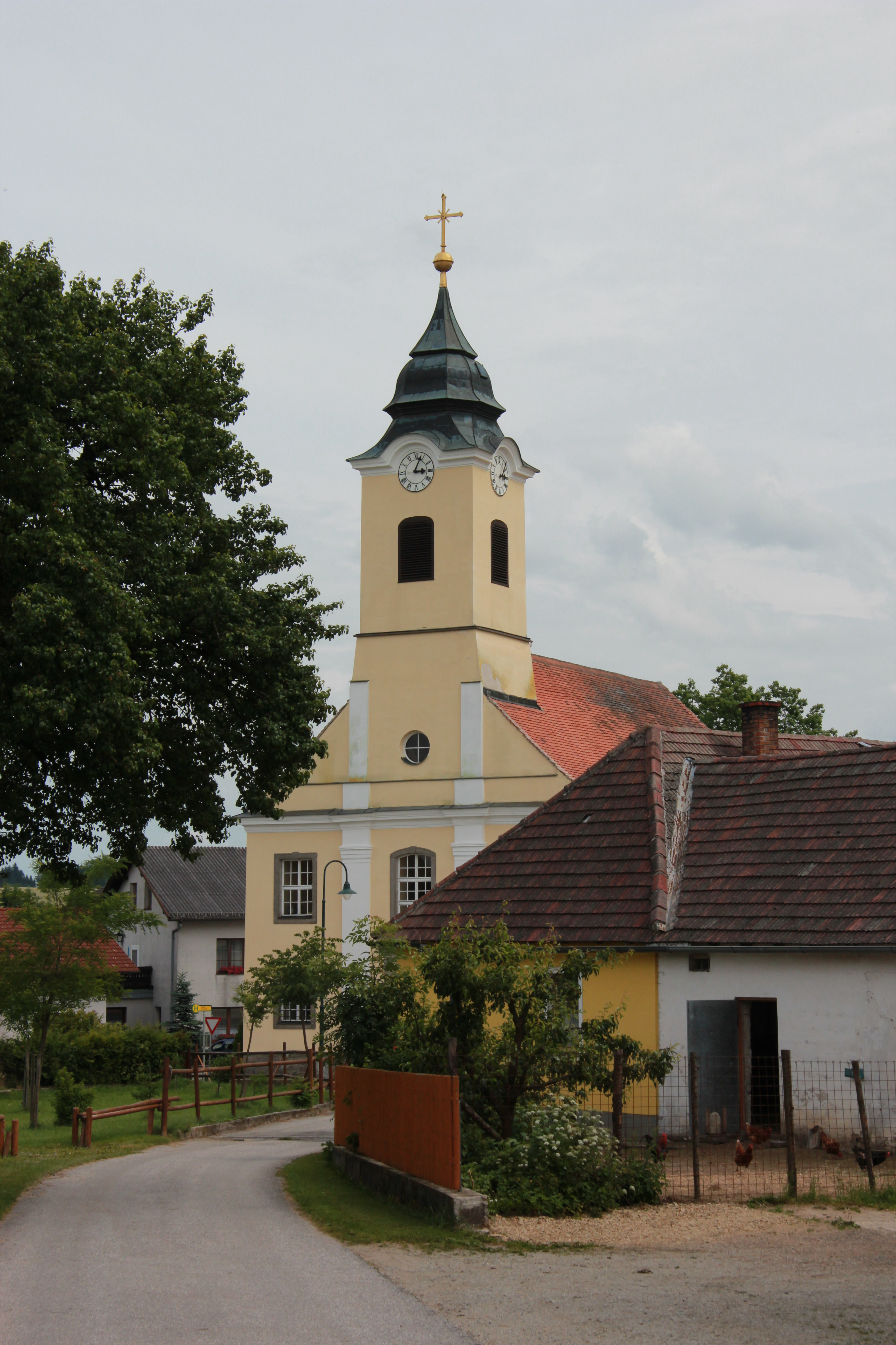 Reingers im niederösterreichischen Waldviertel